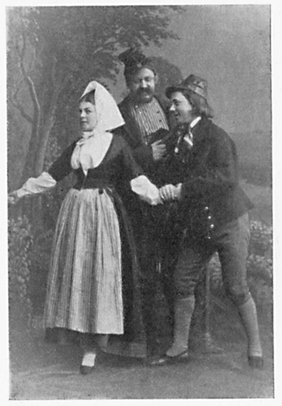 Nerkingarne. Södra teatern, Stockholm. Pjäs av Axel Anrep. På bilden: Stina - Anna de Wahl; Östing - V. Holmqvist; Lasse - G. Bergström